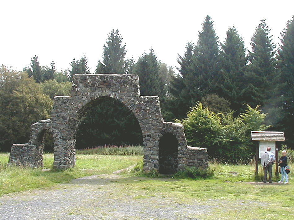 Ehemaliger Eingang zum Reichsarbeitsdienstlager (RAD) am Schwarzen Moor in der Rhön